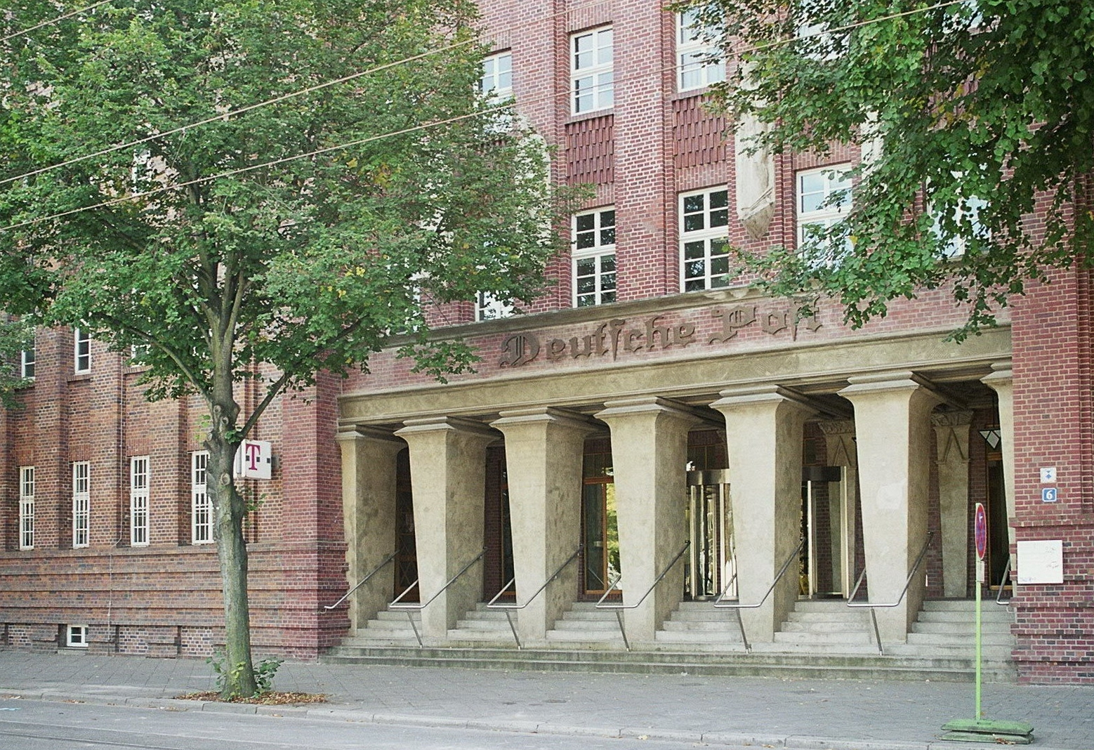 Magdeburg, ehem. Dienstgebäude Deutsche Post der DDR